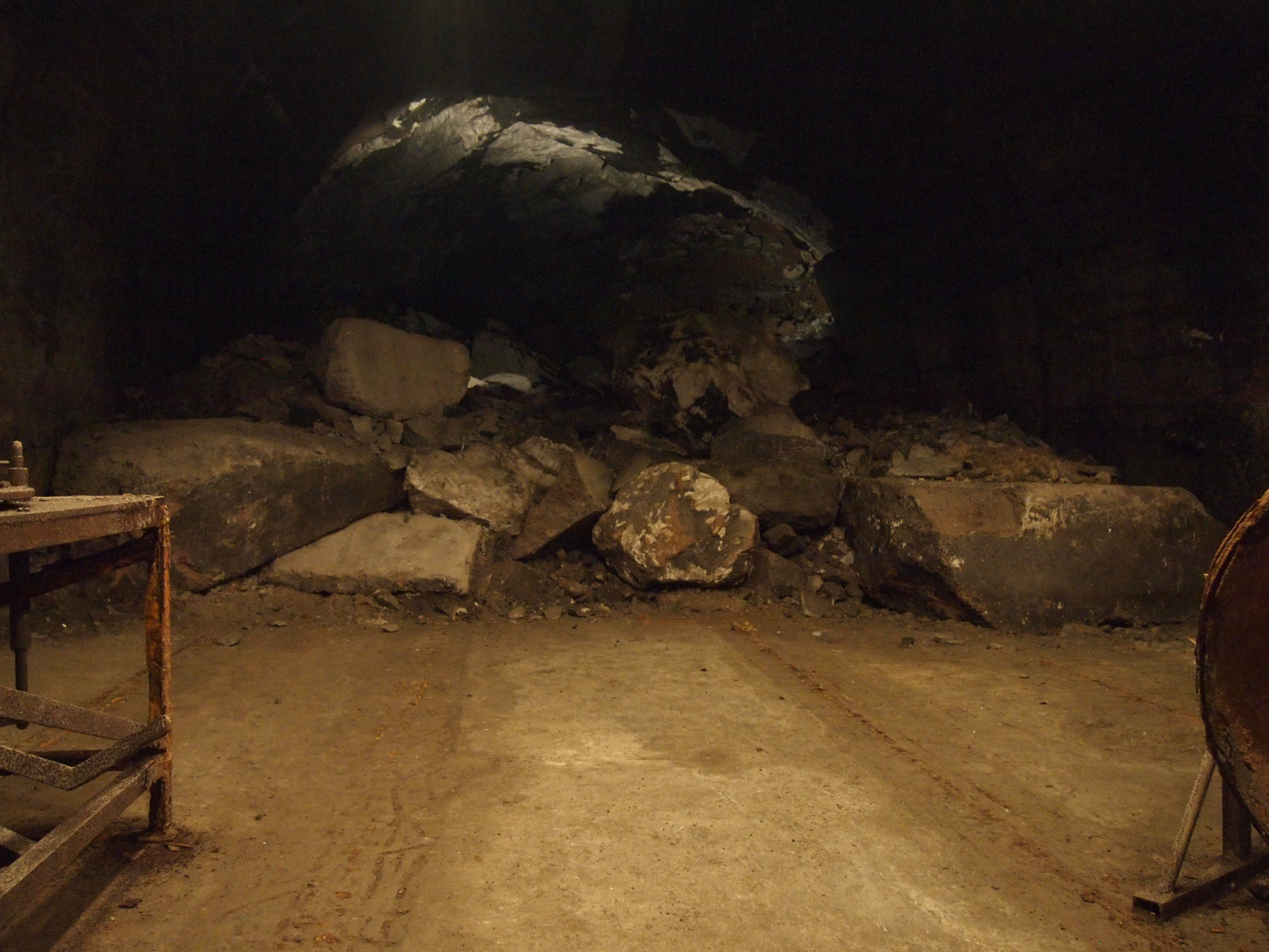 Mittelbau Dora, versprengter Stolleneingang des rechten Hauptstollen von innen.